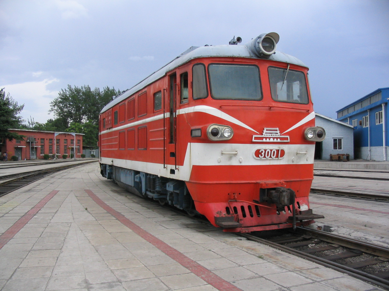 中文（中国大陆）: 北京型3001号机车在北京二七机车厂